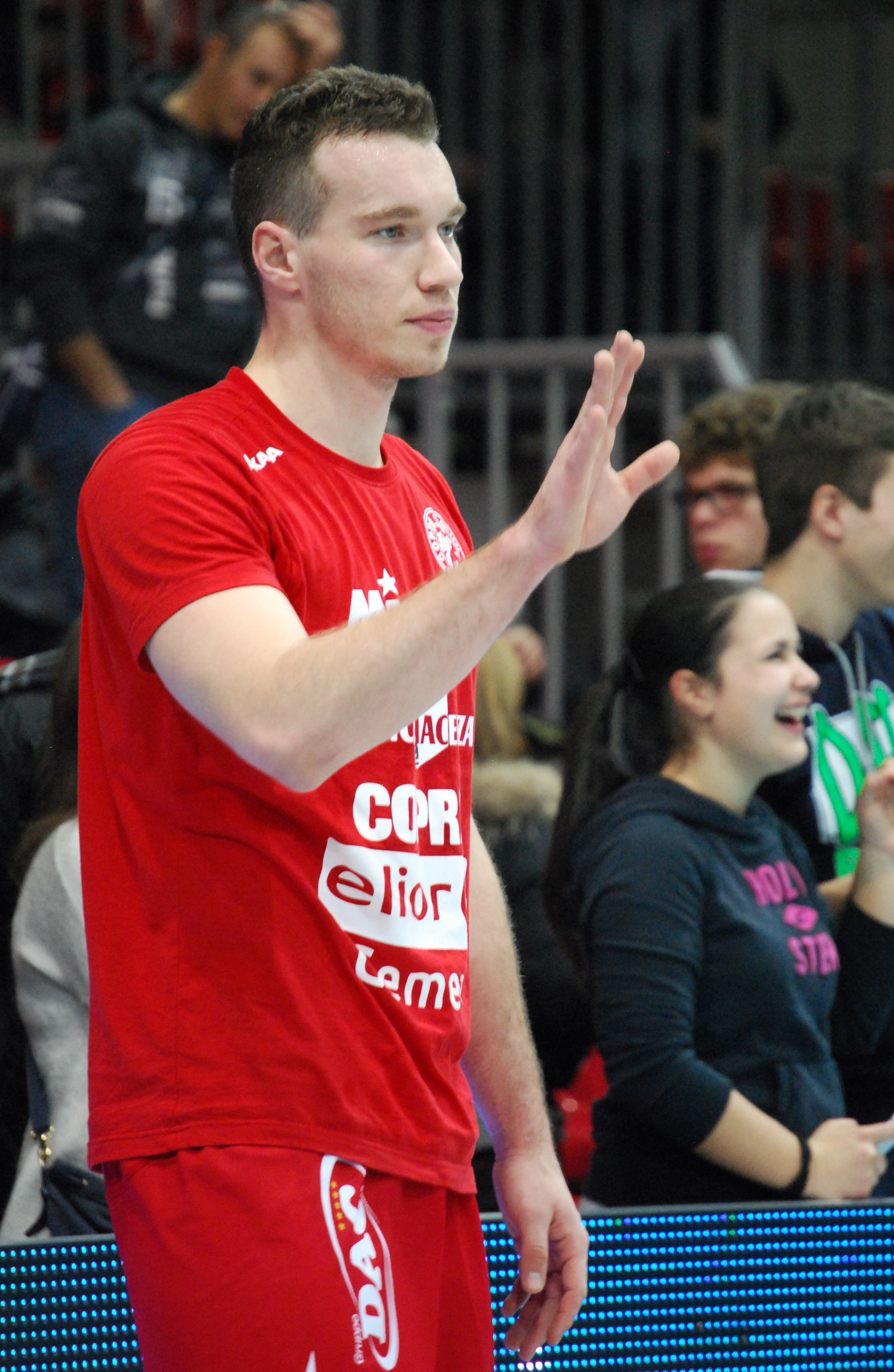 Denys Viktorovic Kaliberda